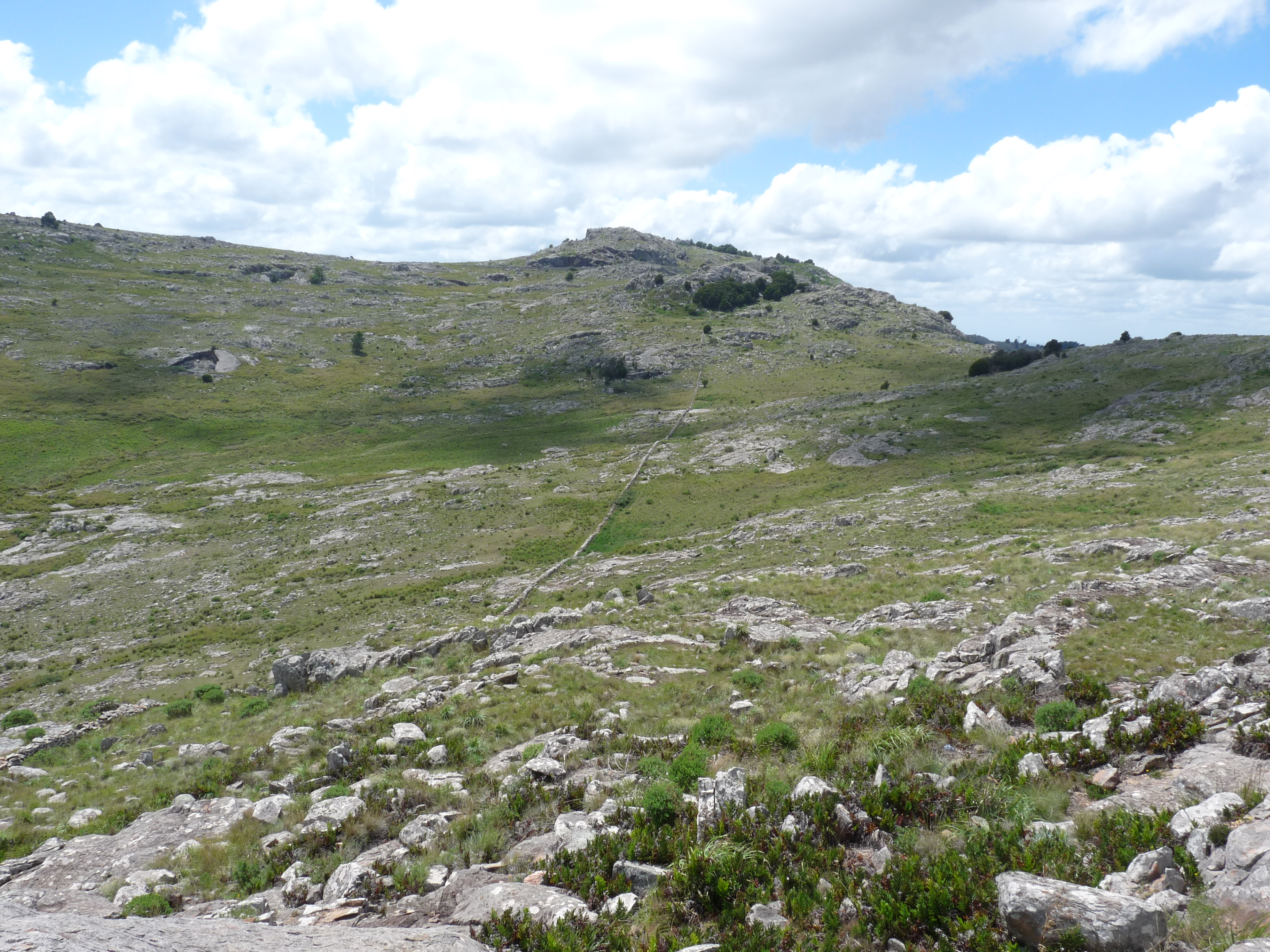 Cerro de las Ánimas